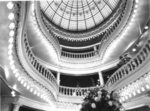 Kaufhaus Bonneterie Amsterdam 1909